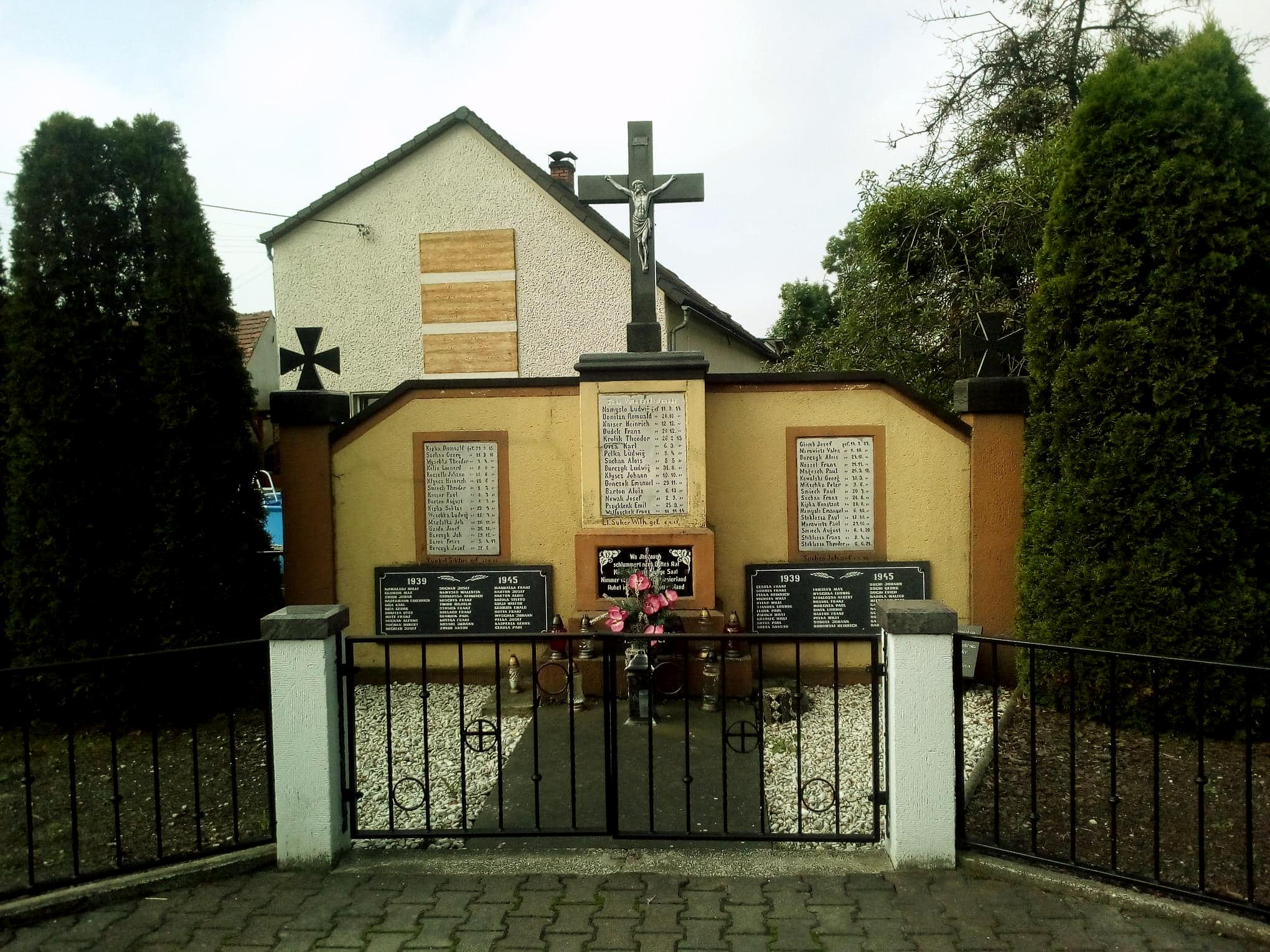 Brożec 2020 - Pomnik ofiar I i II WŚ